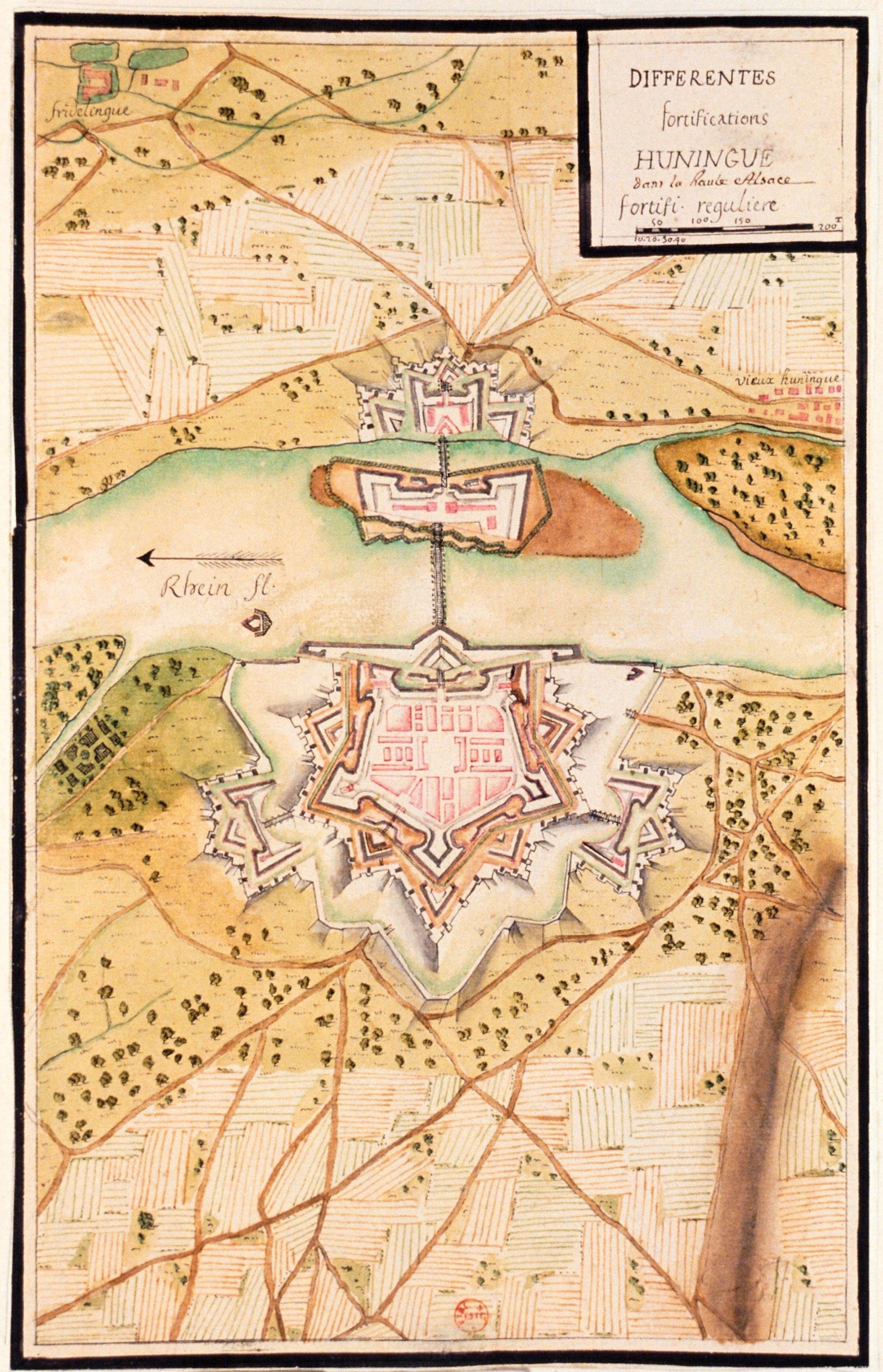 Differentes fortifications. Huningue dans la haute Alsace